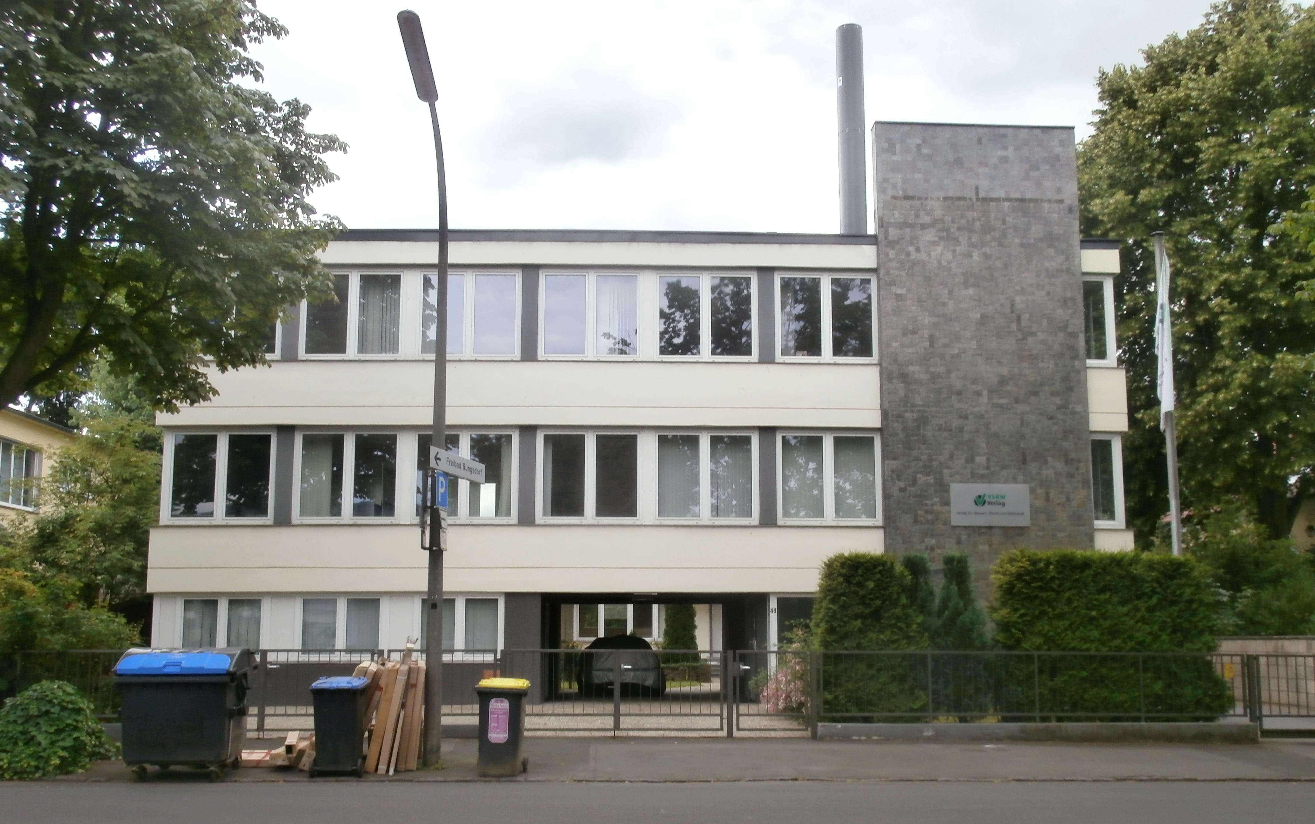 Sitz des VSRW-Verlags (ehemaliges Kanzleigebäude der Botschaft von Madagaskar), Rolandstraße 48, Rüngsdorf, Bad Godesberg